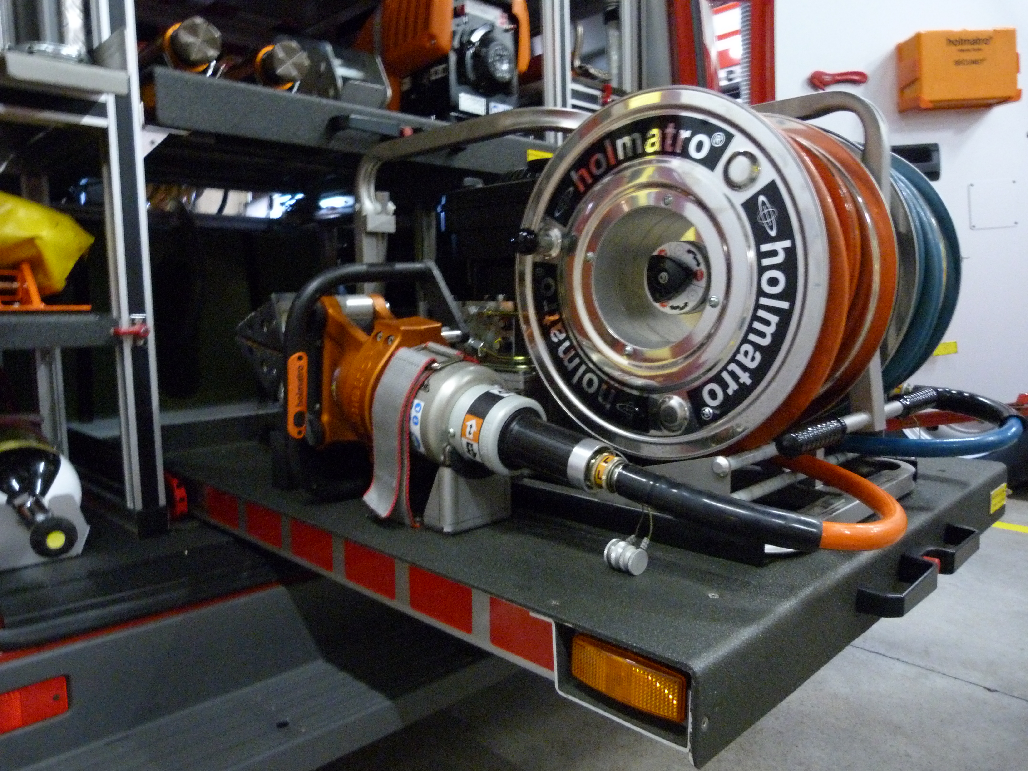 Groupe de désincarcération des pompiers belges avec un écarteur à l'avant plan.